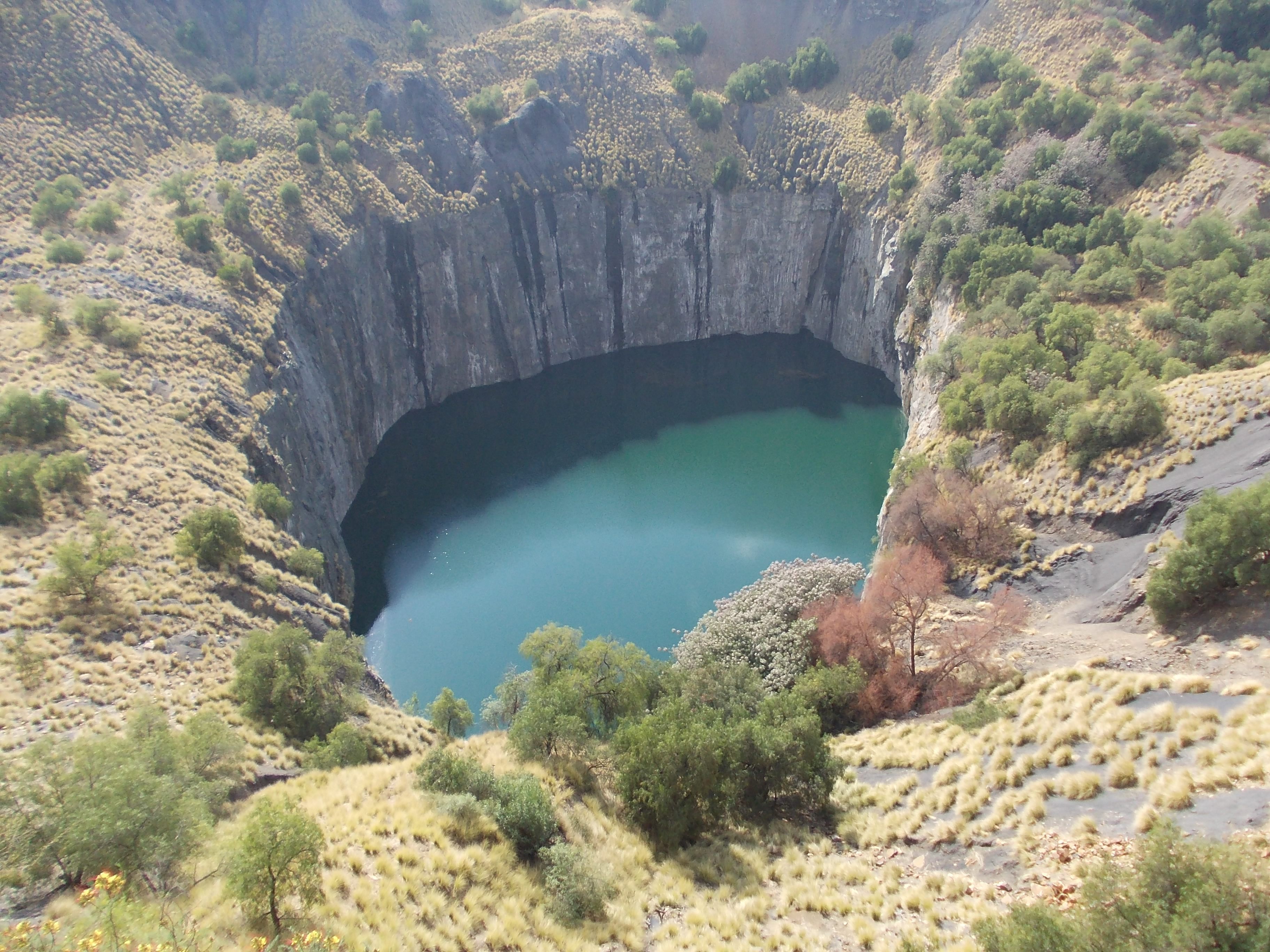 Die Groot Gat in Kimberly, Oktober 2011.